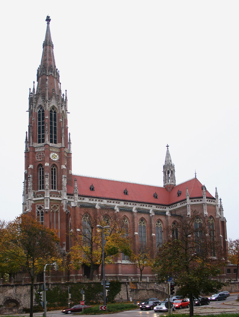 Heilig Kreuz in Giesing, Munich (Bavaria)